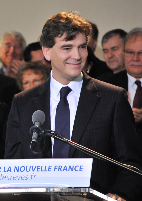 Arnaud Montebourg lors de sa déclaration de candidature à la présidence de la République à Frangy-en-Bresse le 20 novembre 2010